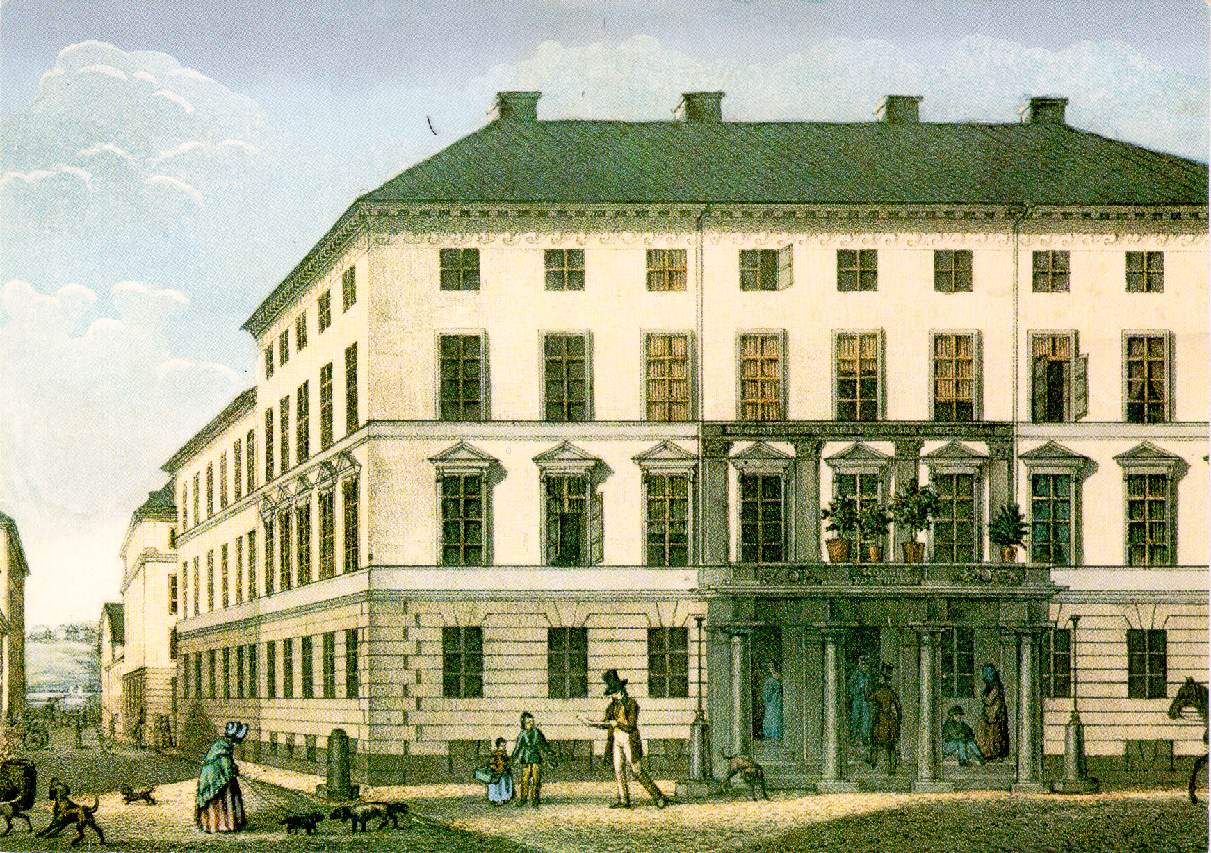 Posthuset vid Lilla Nygatan 6, numera Postmuseum, efter en litografi från 1840-talet av Ferdinand Tollin (1807-1860).